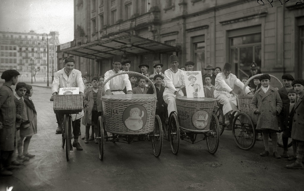 Título original: Repartidores de chocolate 'Elgorriaga' con sus bicicletas de reparto junto al Teatro Victoria Eugenia (1/2) Localización: San Sebastián (Guipúzcoa)